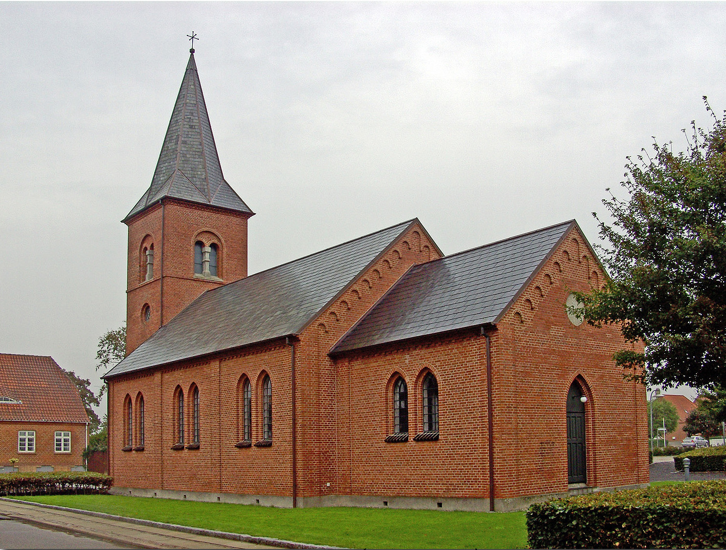 fra sydøst